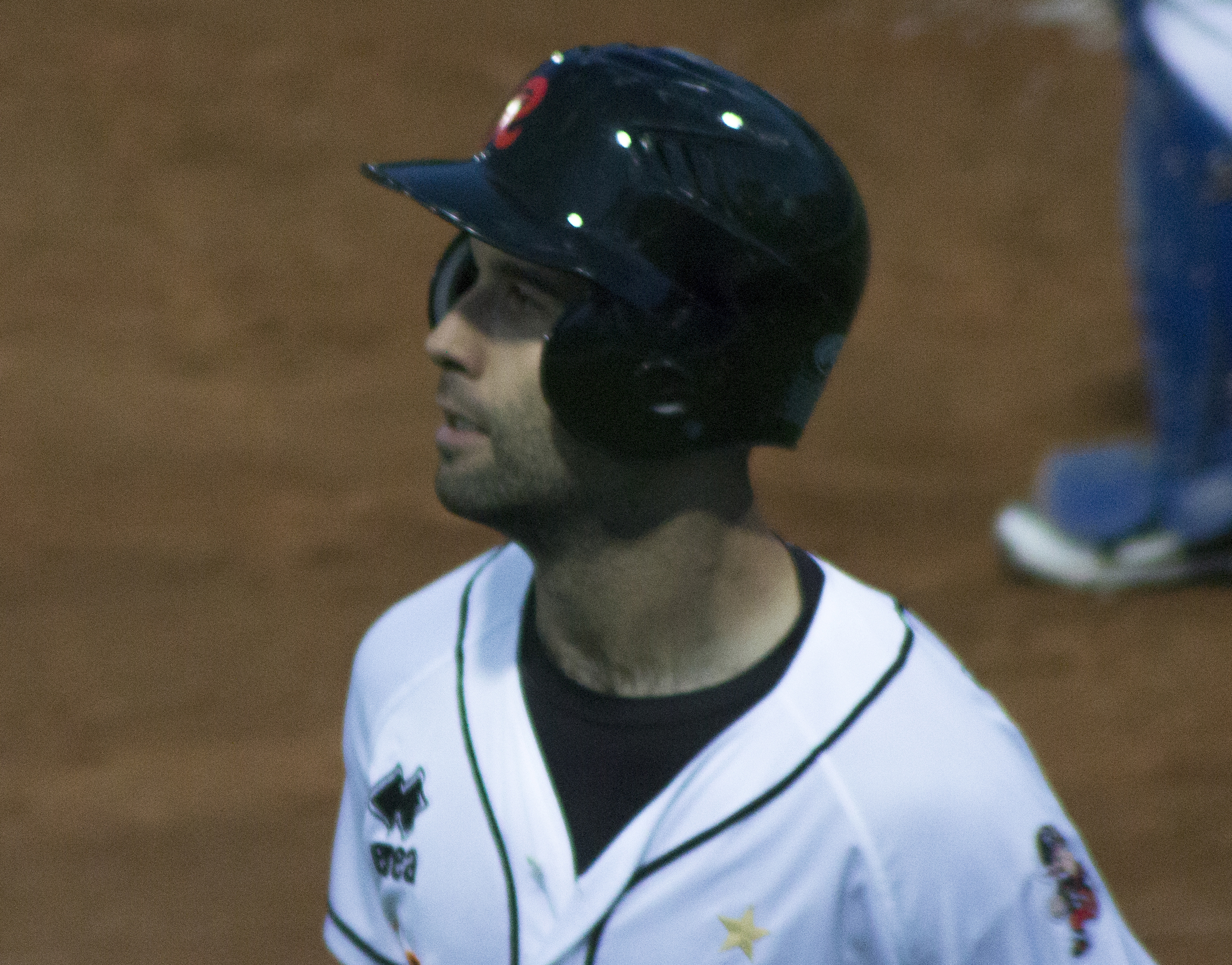 Riccardo Bertagnon durante San Marino-Rimini, gara valida per l'Italian Baseball League 2013. Foto scattata da me dagli spalti con obiettivo 70-300.